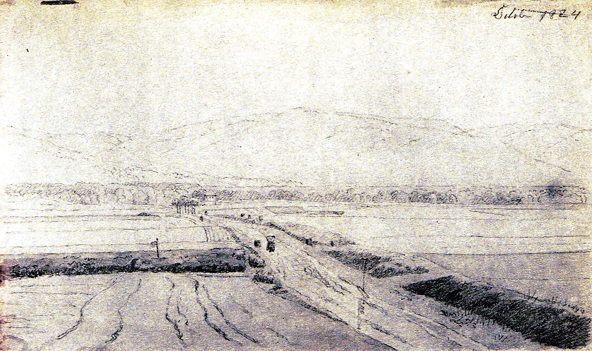 Landstraße in Ebene mit Bergen, Oktober 1824, Aquarell, Bleistift, 11,8 x 19,6 cm